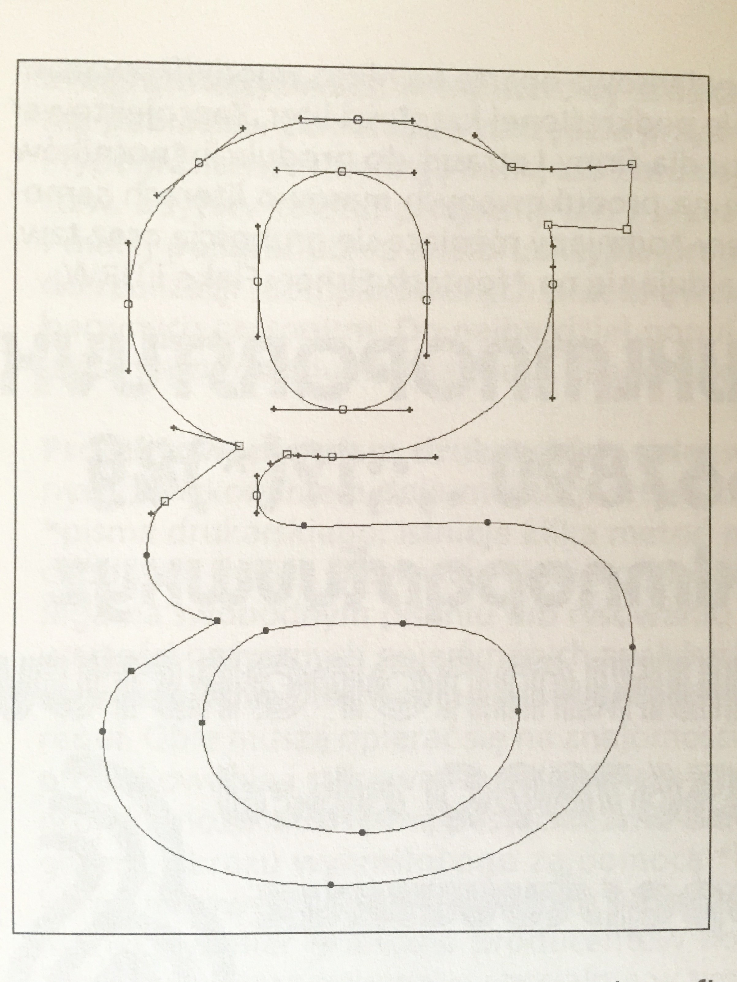 Obraz z programu Fontographer, uaktywnione punkty korpometryczne pozwalają na zmianę kształtów litery